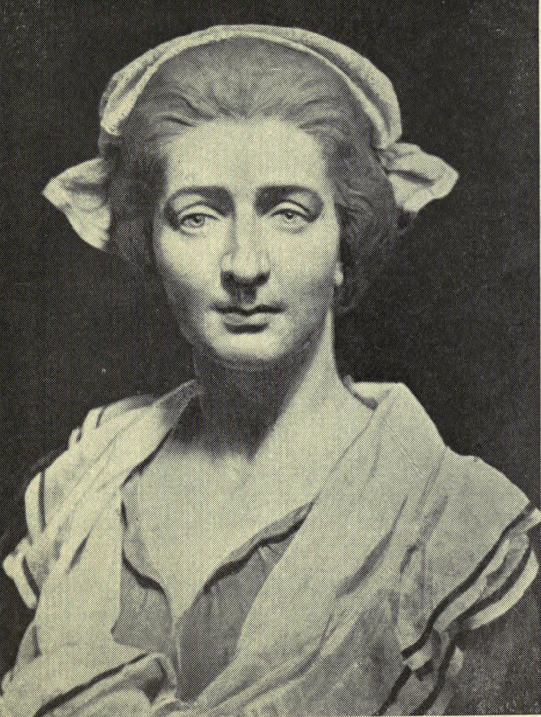 Madame Tussaud, age 20.